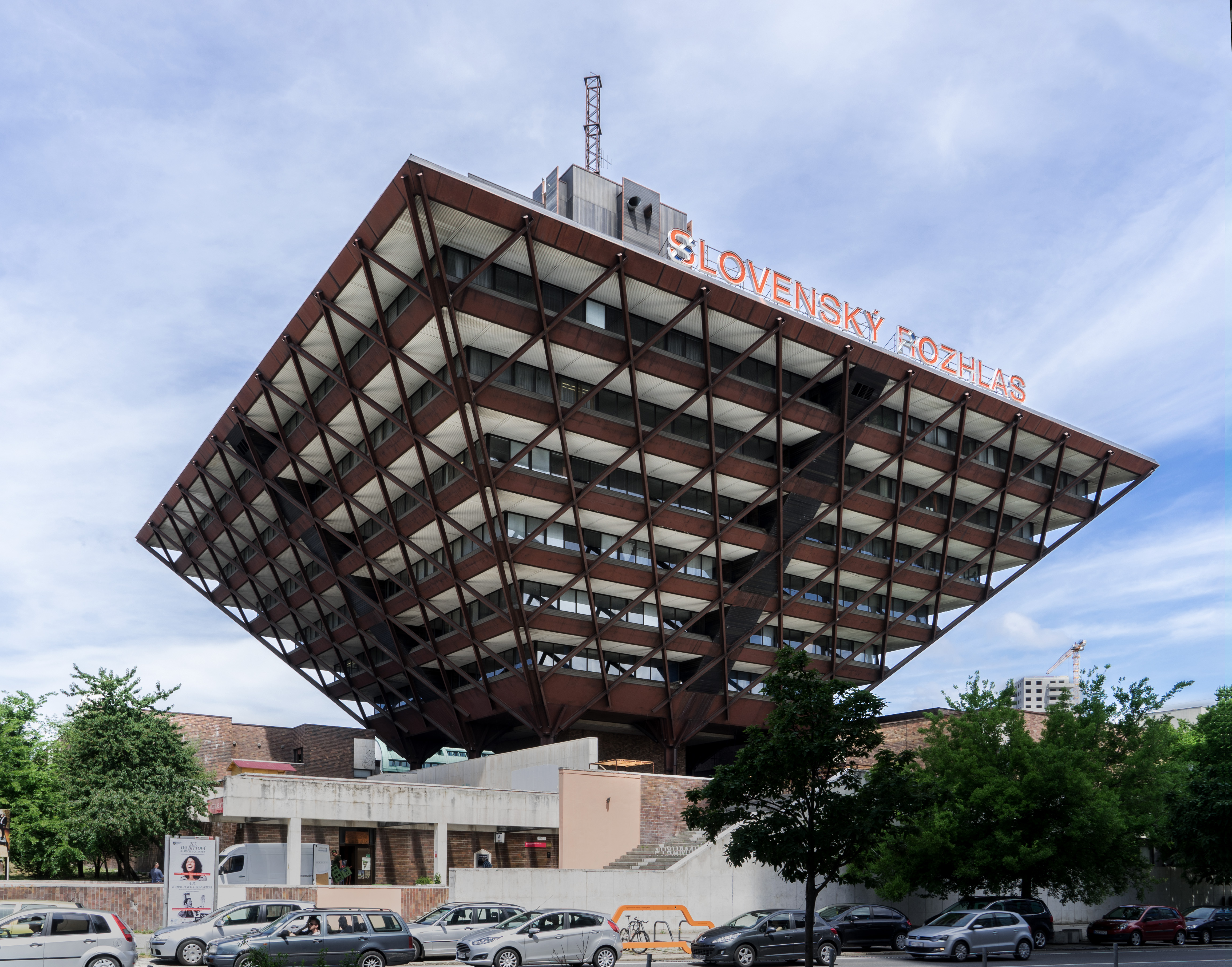 Upside down Pyramid, Bratislava